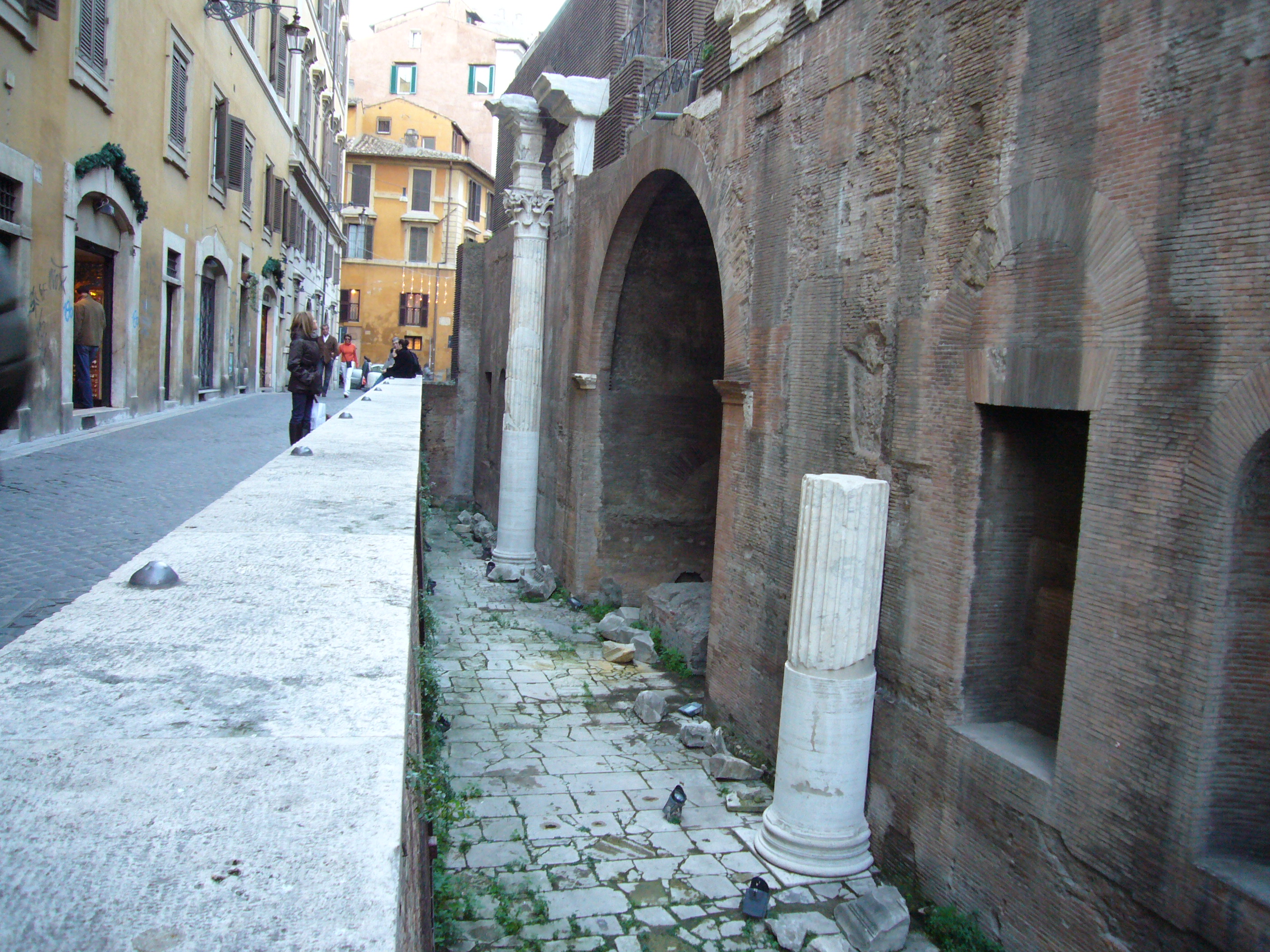 Roma, Basilica di Nettuno a via della Palombella (Pantheon)